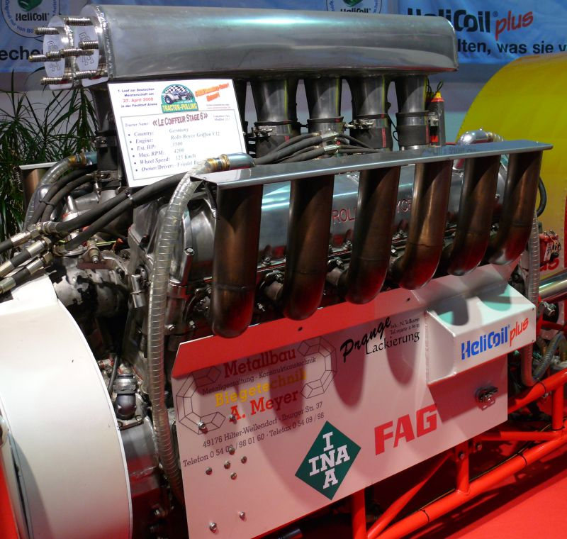 Rolls Royce Griffon im Stage VI des Le Coiffeur Pulling Teams, Bad Iburg